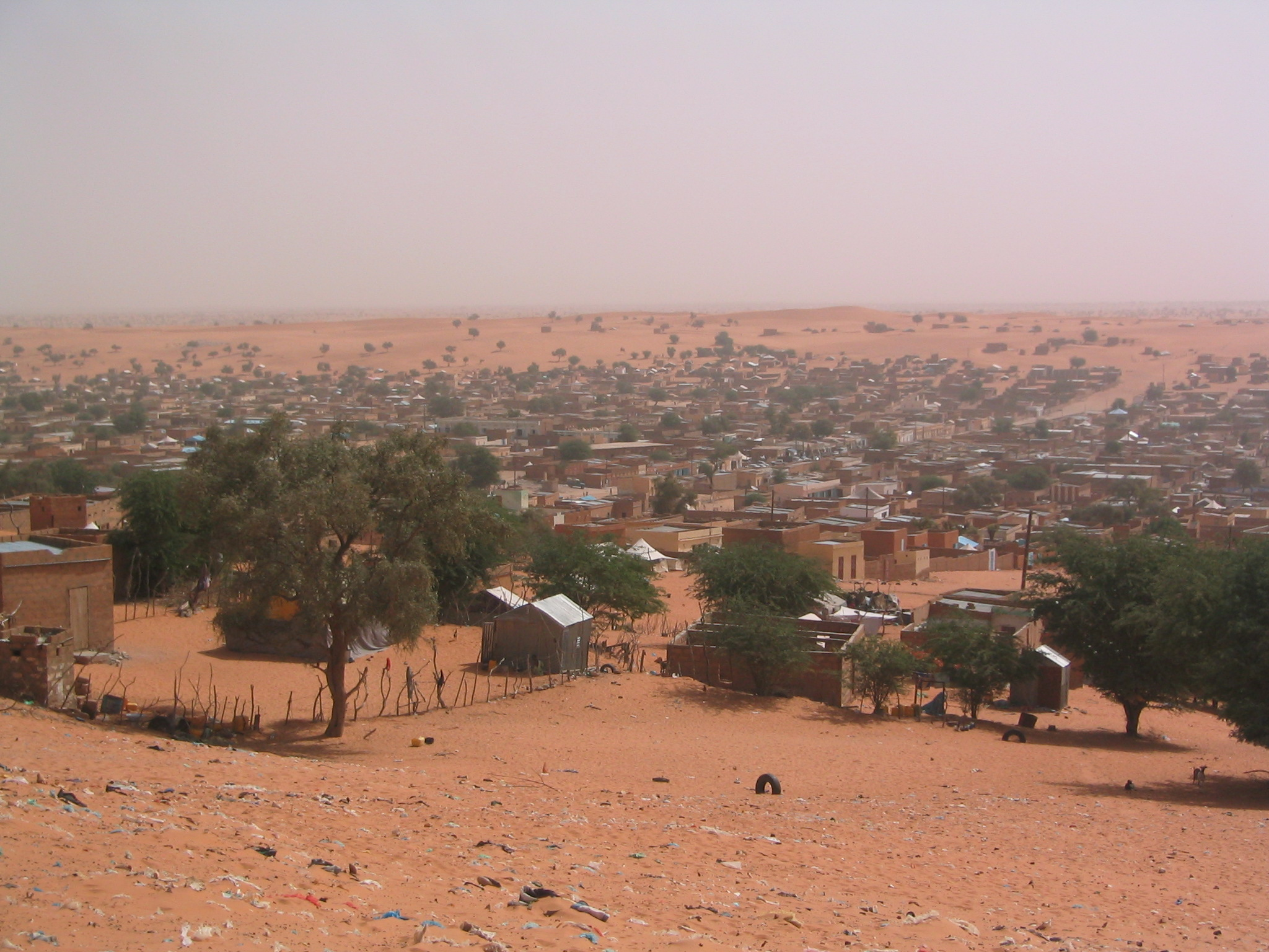 Boutilimit (Mauritanie), envahie par le sable (vue depuis le fort)